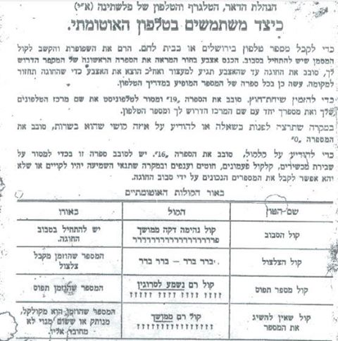 הוראות הנהלת הדואר, הטלגרף והטלפון של פלשתינה א"י - כיצד משתמשים בטלפון האוטומתי, 1925